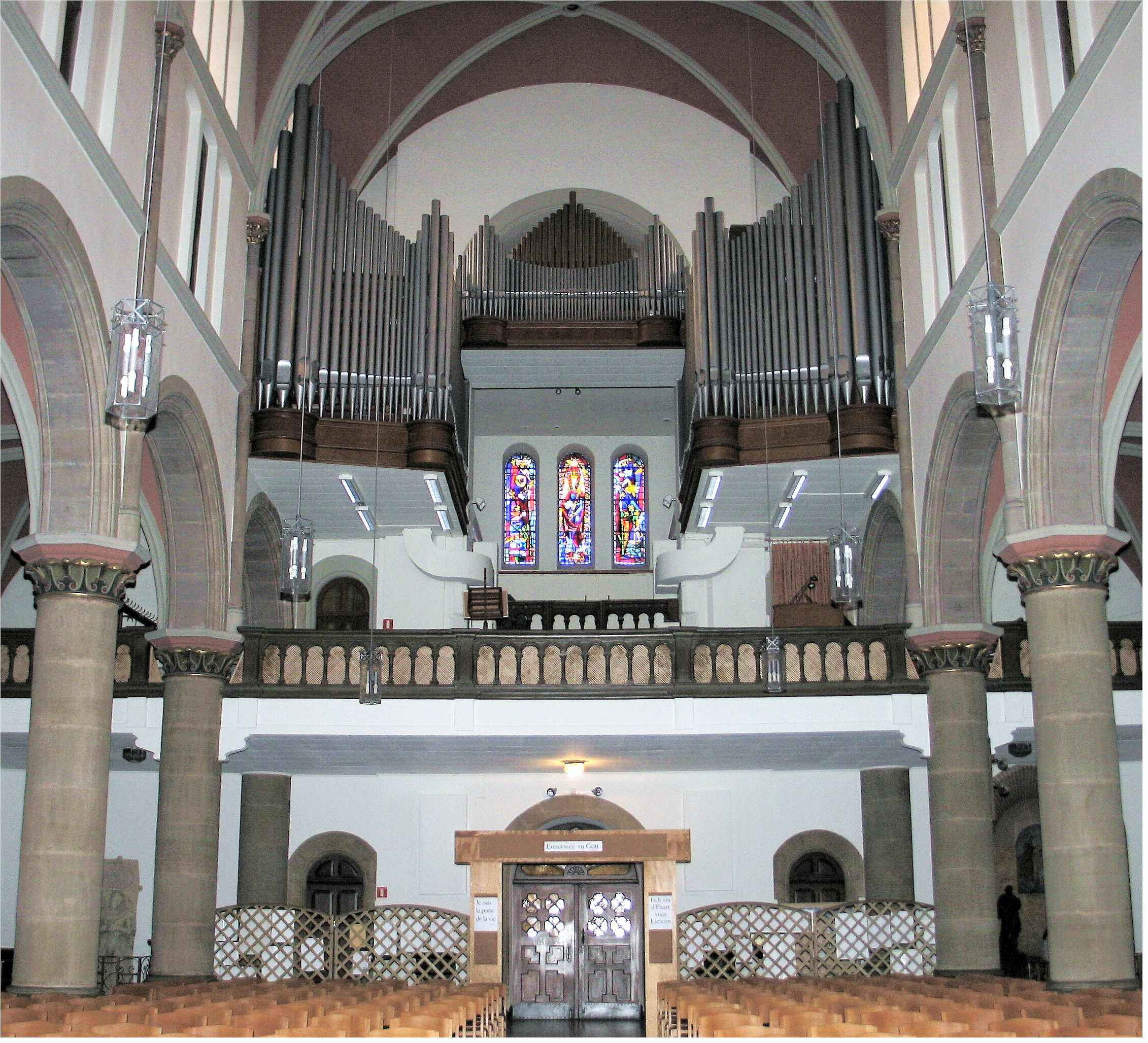 Uergel Beetebuerg (Lëtzebuerg). Orgel Bettemburg (Luxemburg). Orgue Bettembourg (Luxembourg).